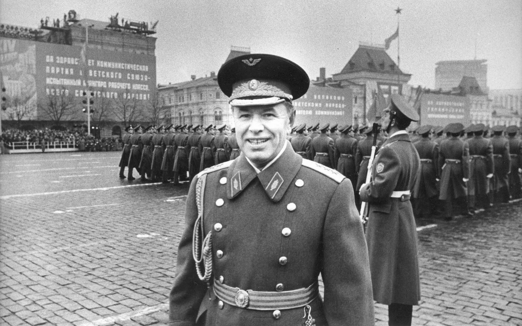 Генерал-полковник авиации Н. М. Скоморохов на военном параде в честь 57-й годовщины Октябрьской революции на Красной площади в Москве